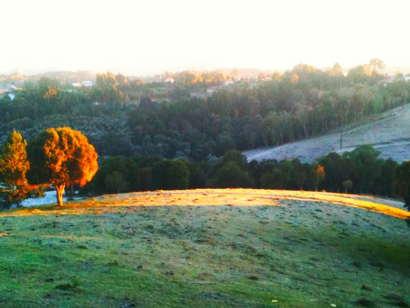 Geada do dia 28/06/2011 em Campo Largo, na Região Metropolitana de Curitiba - PR. No momento da foto, -3 graus na medição.